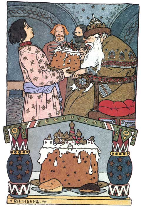 Билибин